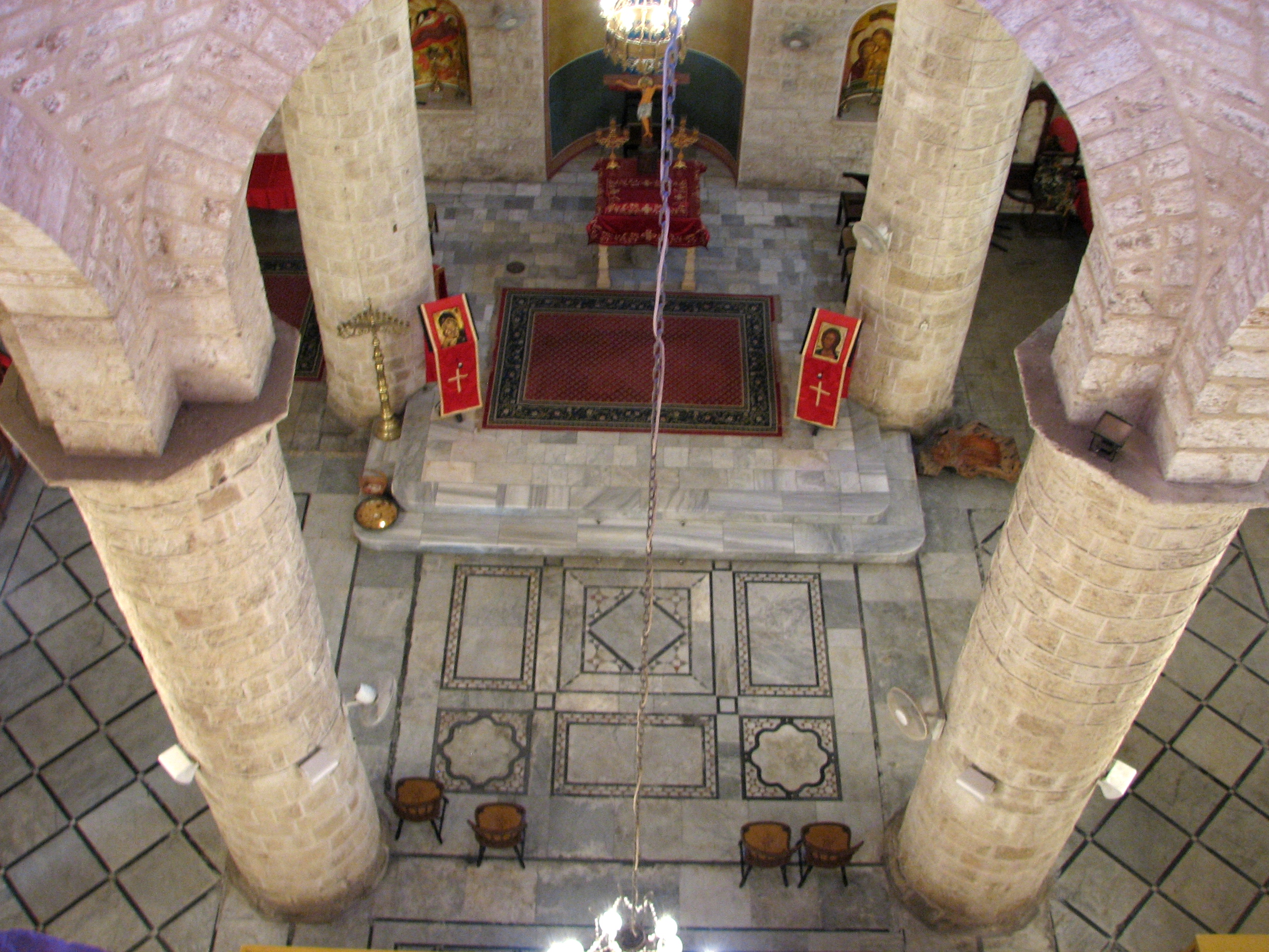 House of Grace, Haifa, Israel הכנסייה היוונית-קתולית הקימה בשנת 1859 כנסייה בשם "א-סיידה" (כנסיית גבירתנו). היום משמש הבית מוסד שיקומי לאסירים משוחררים ובית מחסה לנשים נזקקות שוכן בשדרות הפלי"ם בעיר התחתית בחיפה מבט על תוך הכנסייה מעל, צילום מחלון בכיפת הכנסייה, הבמה בצד מזרח